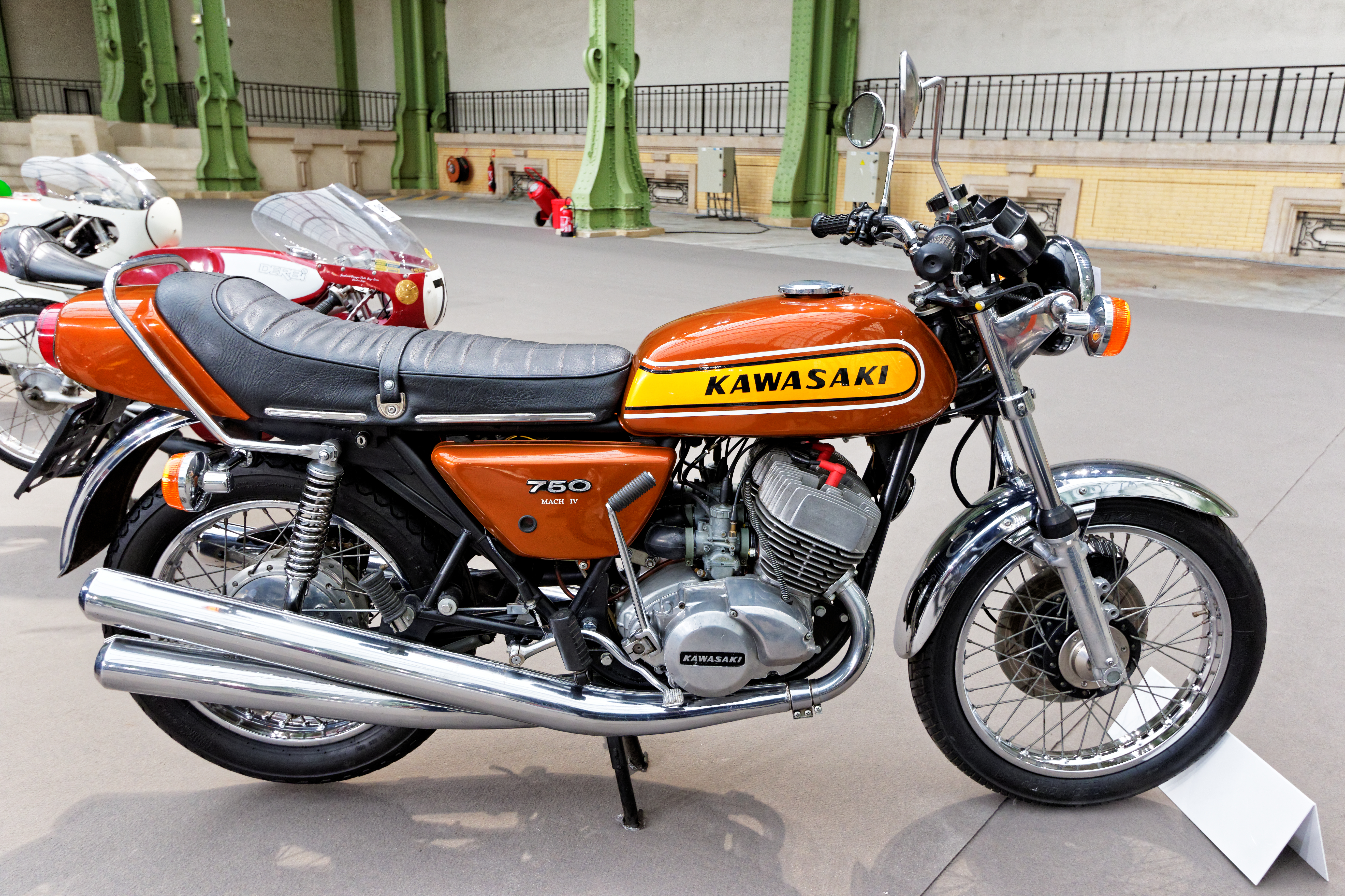 Un des véhicules présenté lors de la vente aux enchères Bonhams 2016 au Grand Palais de Paris.